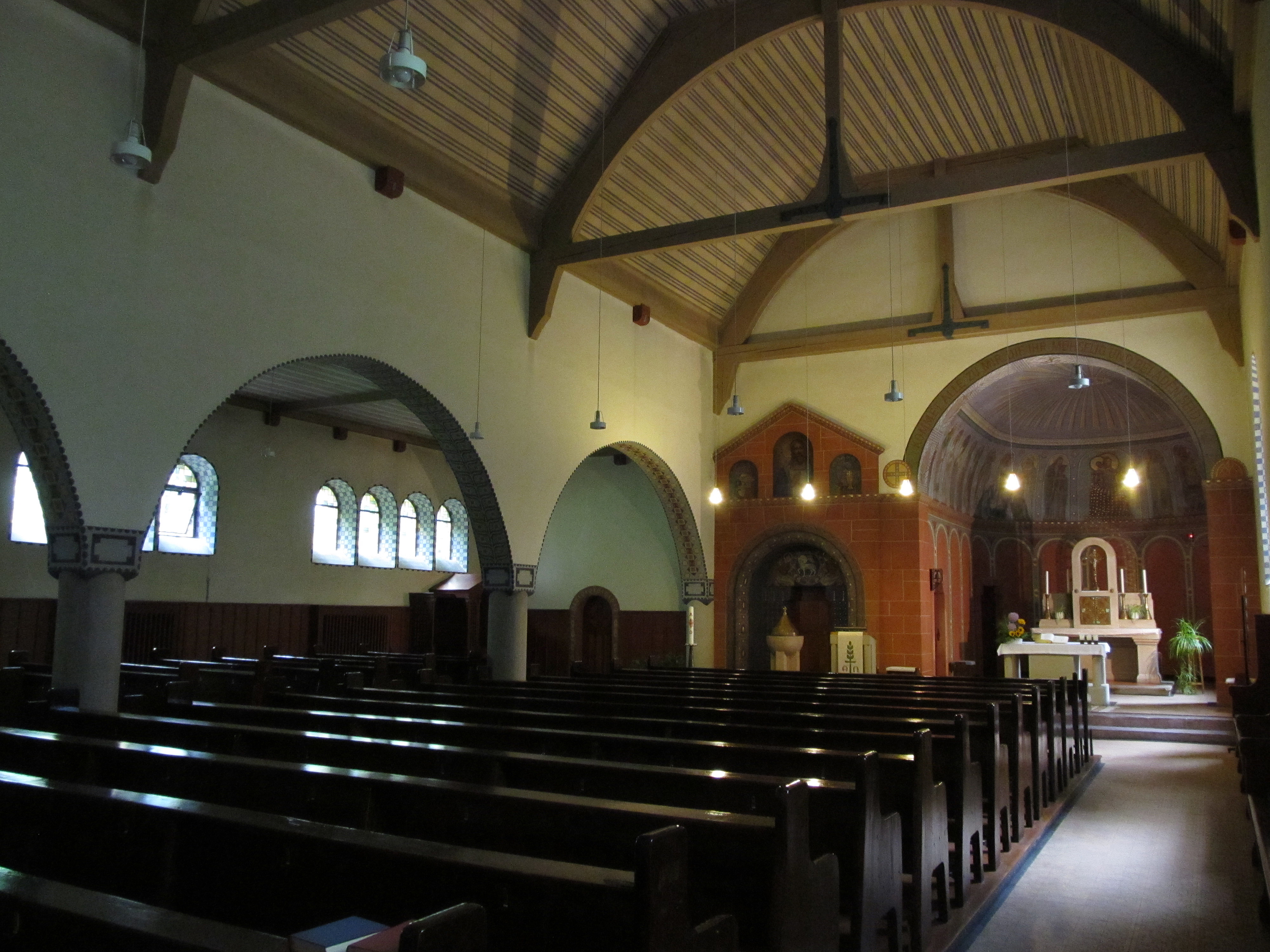 Blick ins Innere der Klinikkirche des Homburger Universitätsklinikums in Homburg, Saarland